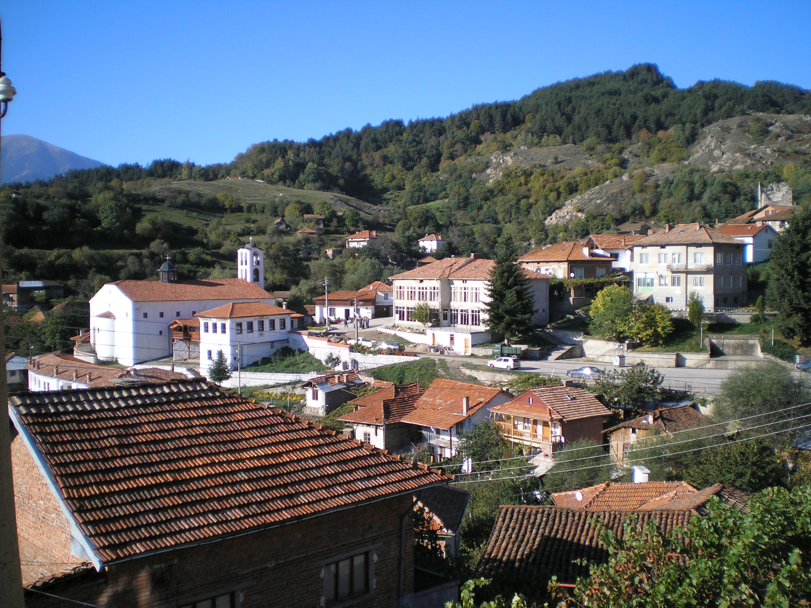 Изглед от с. Тешово с църковния комплекс "Св. Димитър".